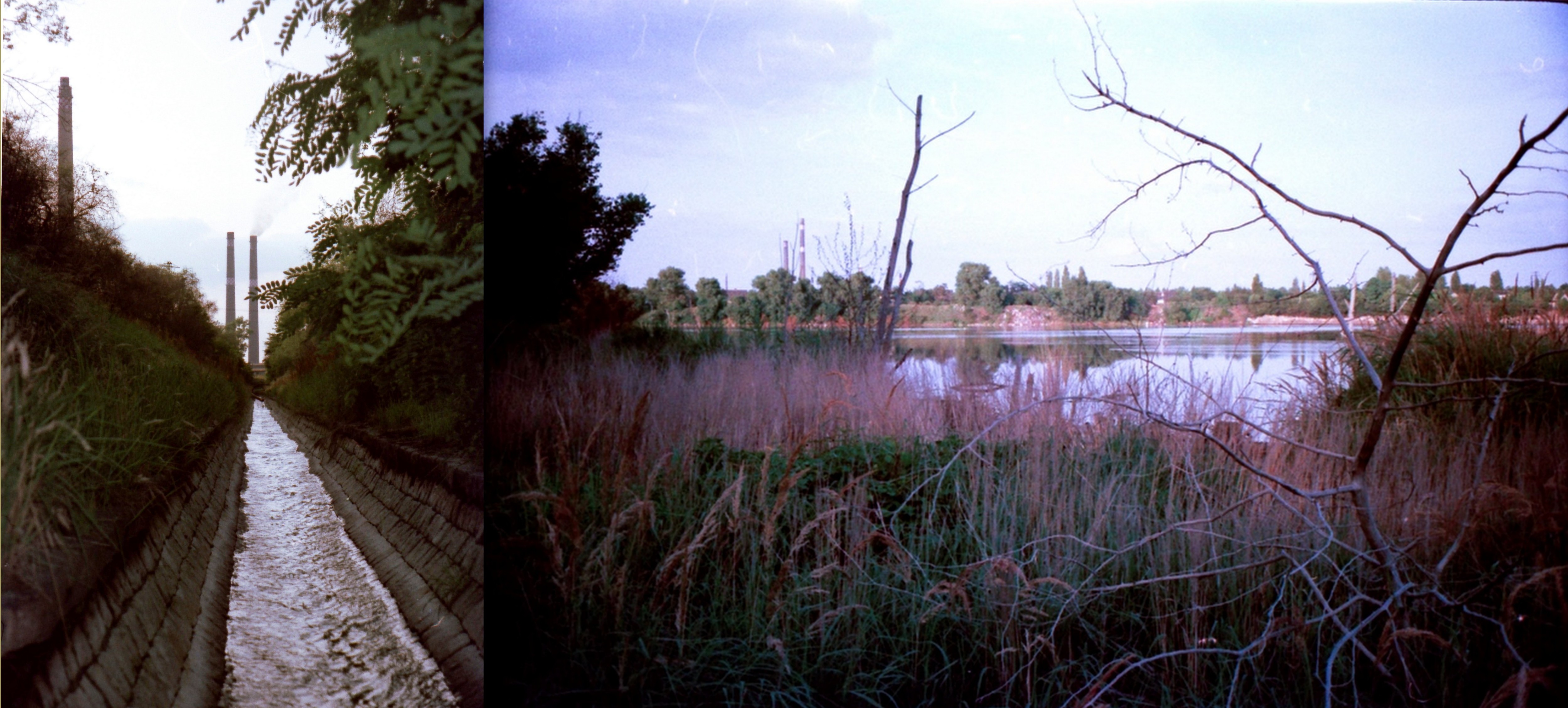 Abwasser der Faserproduktion der Filmfabrik Wolfen fließt zur Grube Johannes (Silbersee)